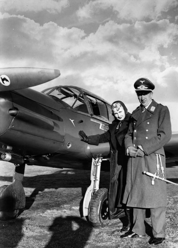 Theo Osterkamp mit Gattin, Me 108 Taifun Oberstlt. [Theodor] Osterkamp Pour le Mérite Flieger und Kommandeur der Jagdfliegerschule Werneuchen mit seiner Gattin vor der Messerschmitt "Taifun". Fot.: Hy Dez. 38 [Oberstleutnant Theodor Osterkamp in Uniform mit Offiziersdolch und mit Ehefrau neben Messerschmitt Me 108 "Taifun" stehend] Abgebildete Personen: Osterkamp, Theodor: Generalmajor, Ritterkreuz (RK), Luftwaffe, Orden Pour le mérite, Deutschland (GND 124745822)